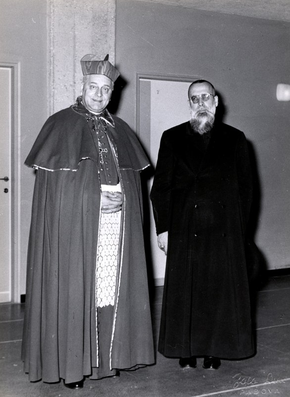 Il cardinale Giovanni Urbani (a sinistra) con il vescovo di Padova Girolamo Bartolomeo Bortignon nel 1964.